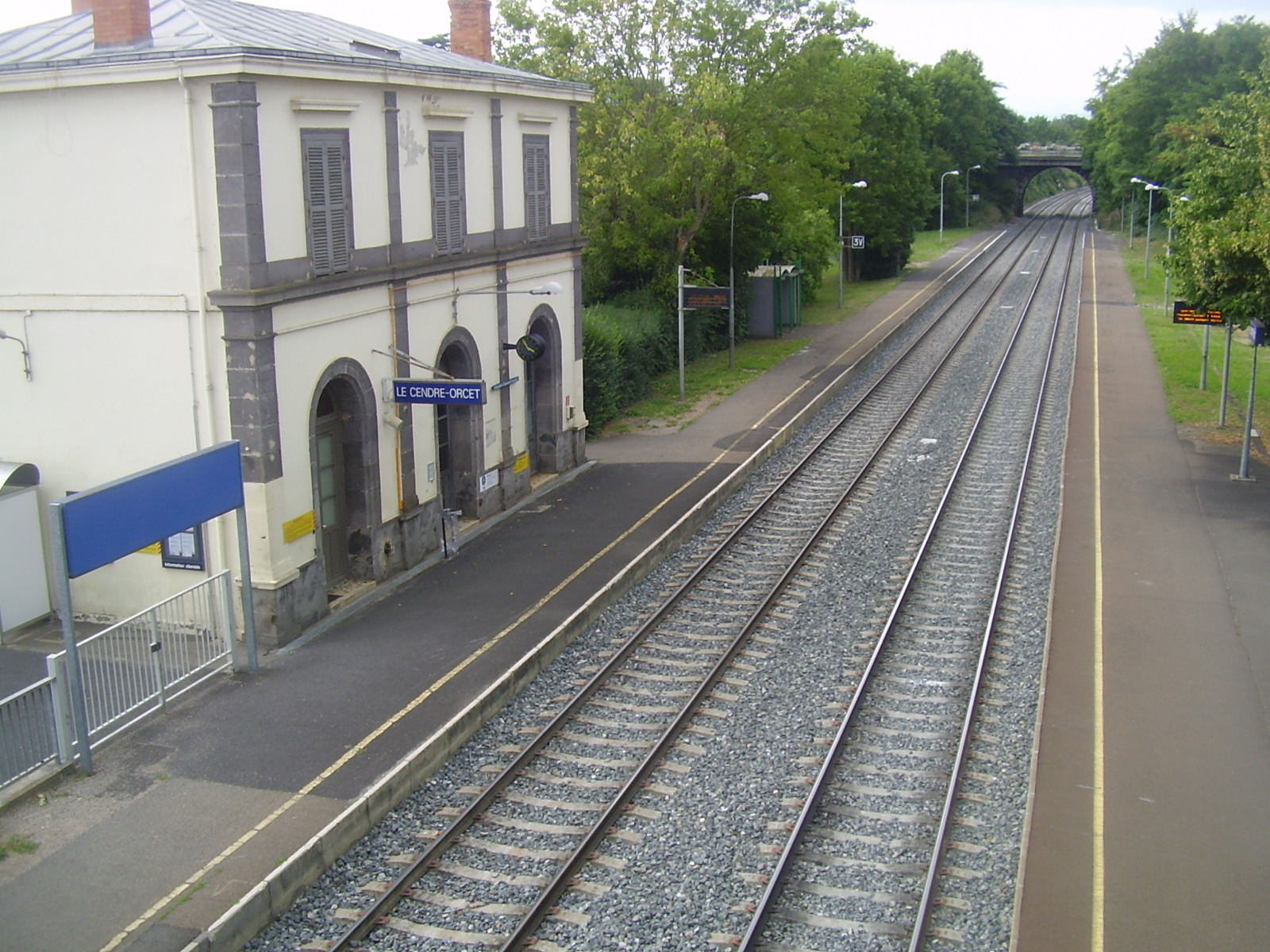 Gare du Cendre-Orcet, Le Cendre, Puy-de-Dôme, Auvergne, France.